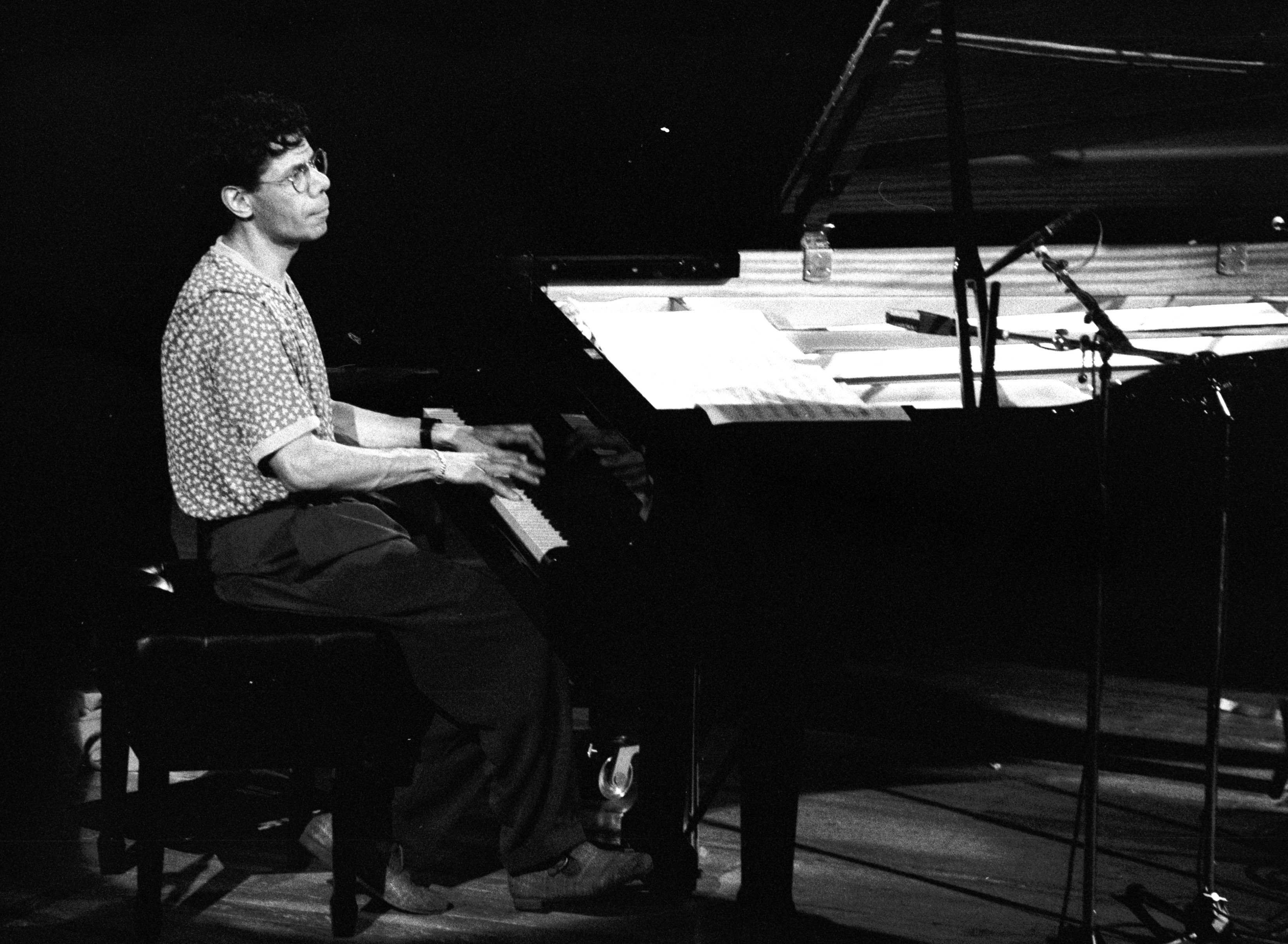 Le pianiste de jazz américain Chick Corea en concert à Deauville (Normandie, France) en 1992.